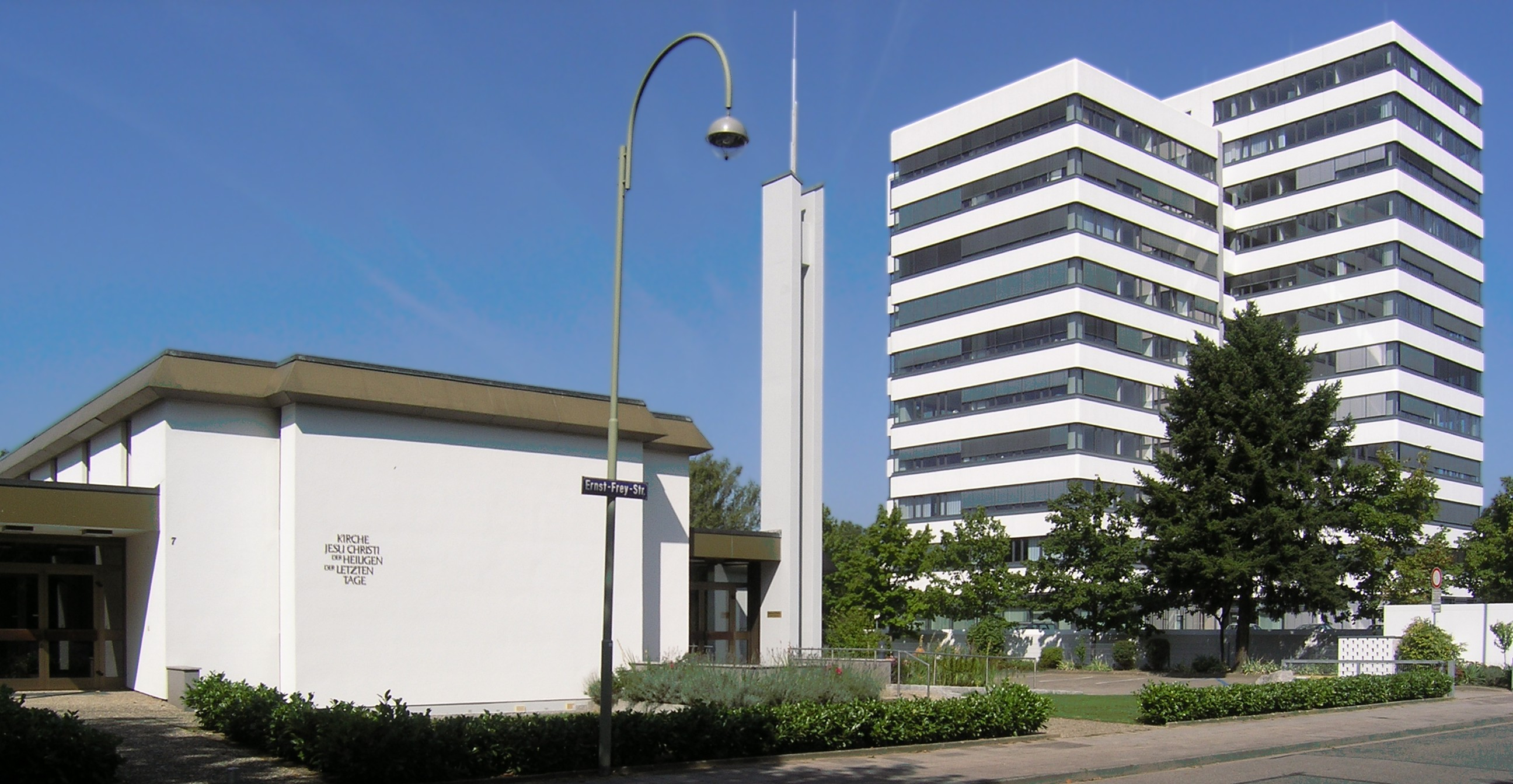 Ernst-Frey-Straße in Karlsruhe, Kirche Jesu Christi der Heiligen der Letzten Tage, 1&1 Internet